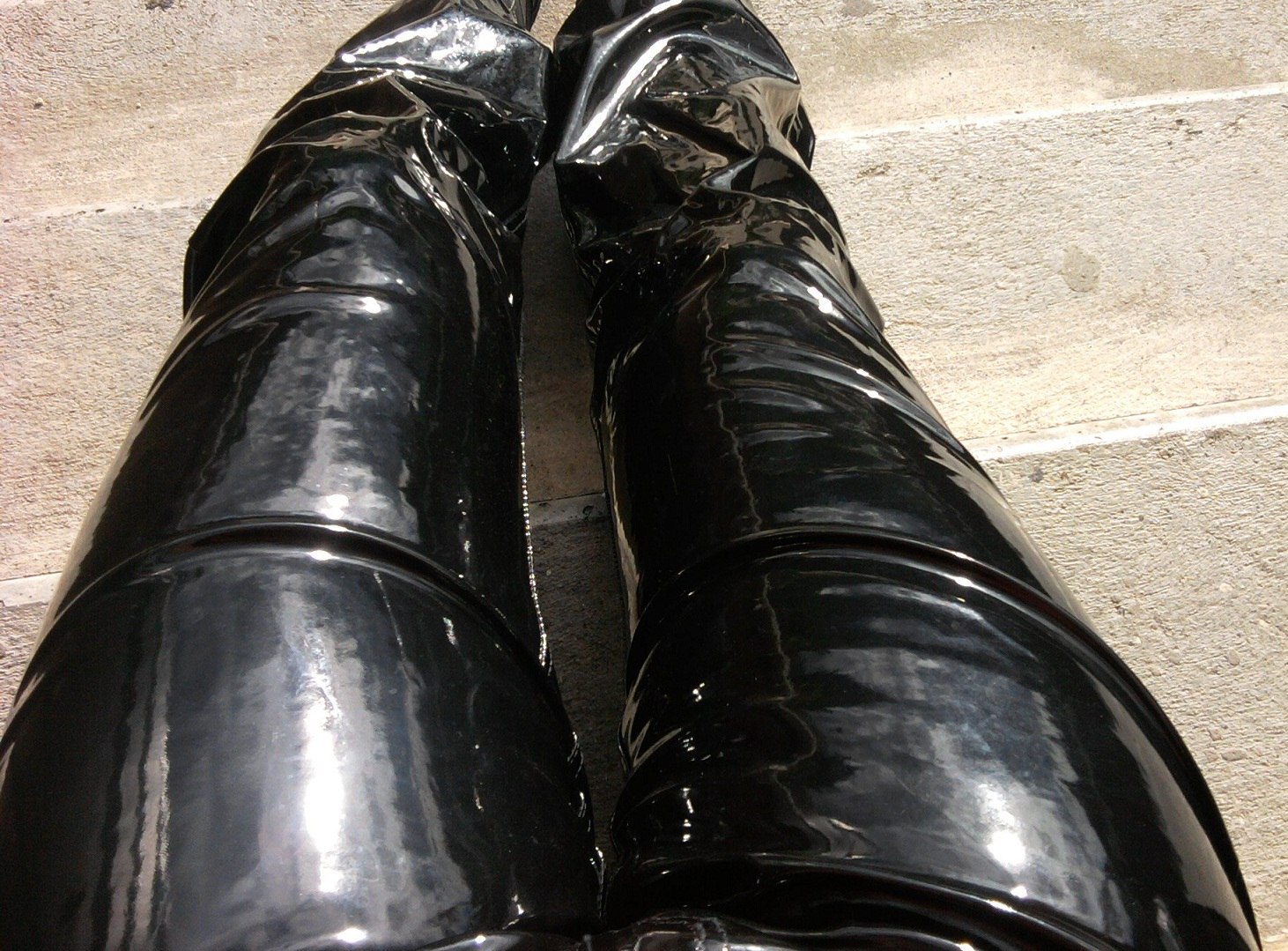 homme portant un pantalon en vinyl noir